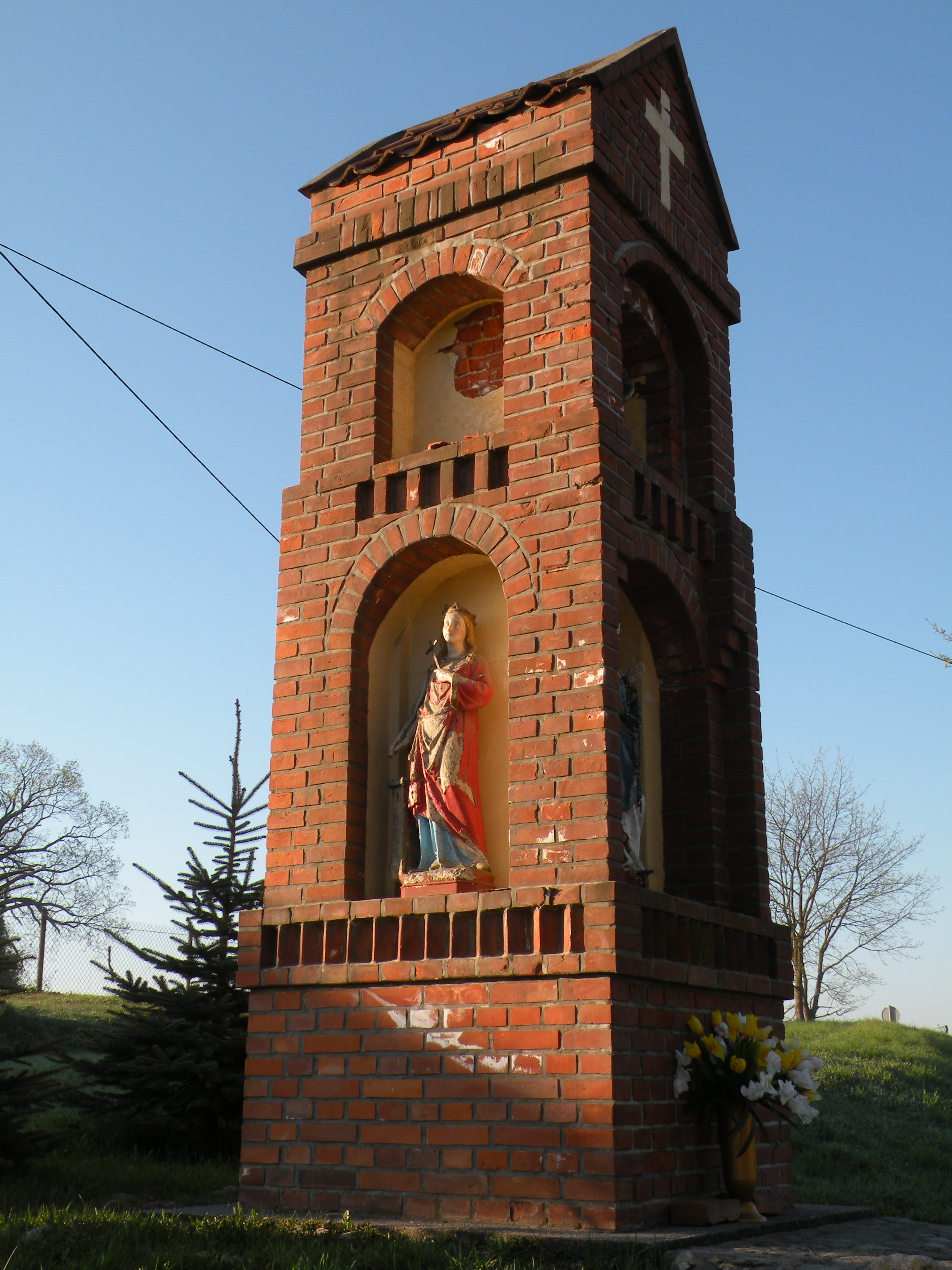 Klebark Mały, kapliczka bliżej skrzyżowania, na początku wsi